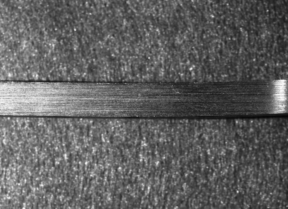 Kanntenschliff